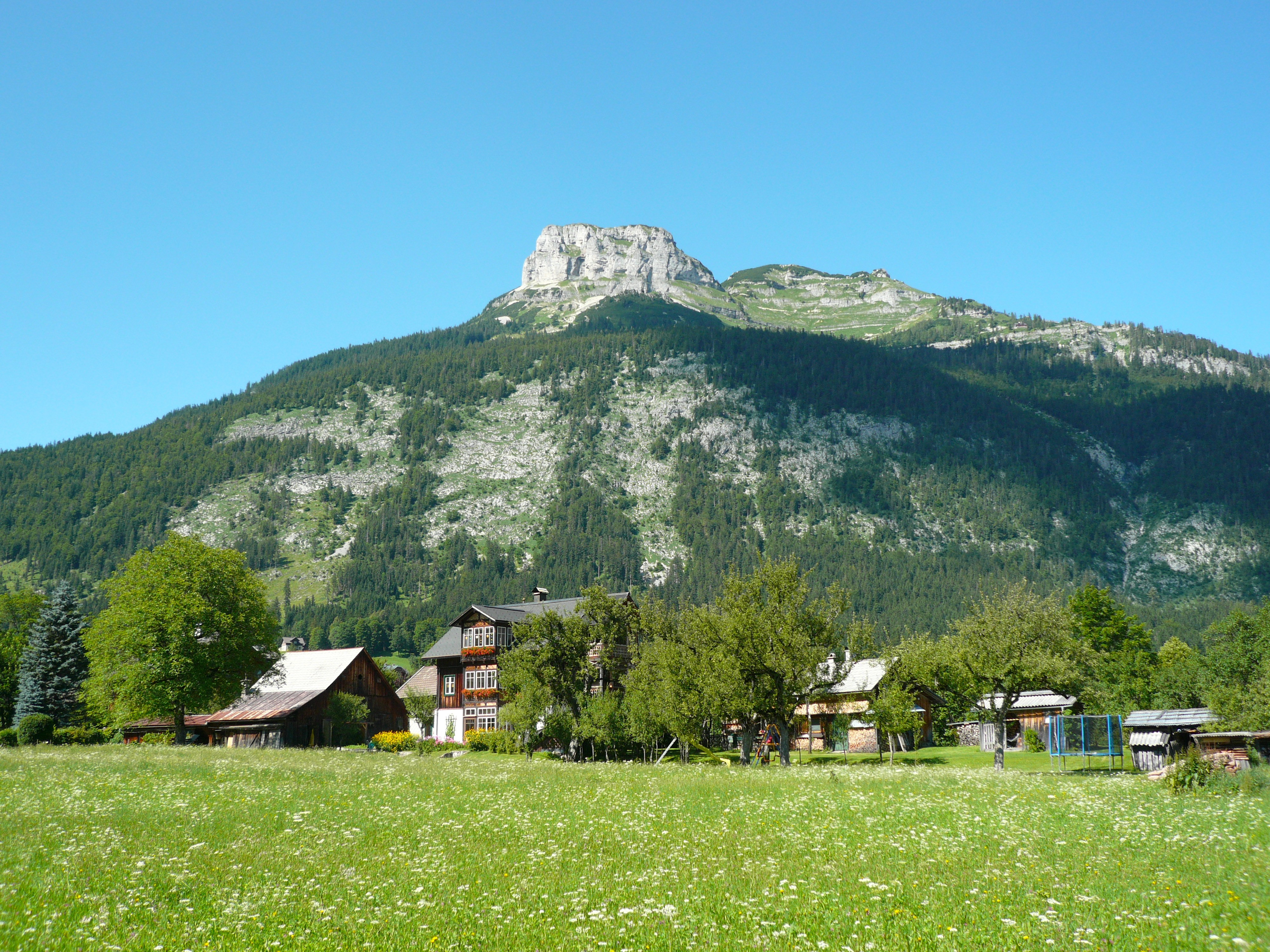 Blick auf den Loser von Altaussee